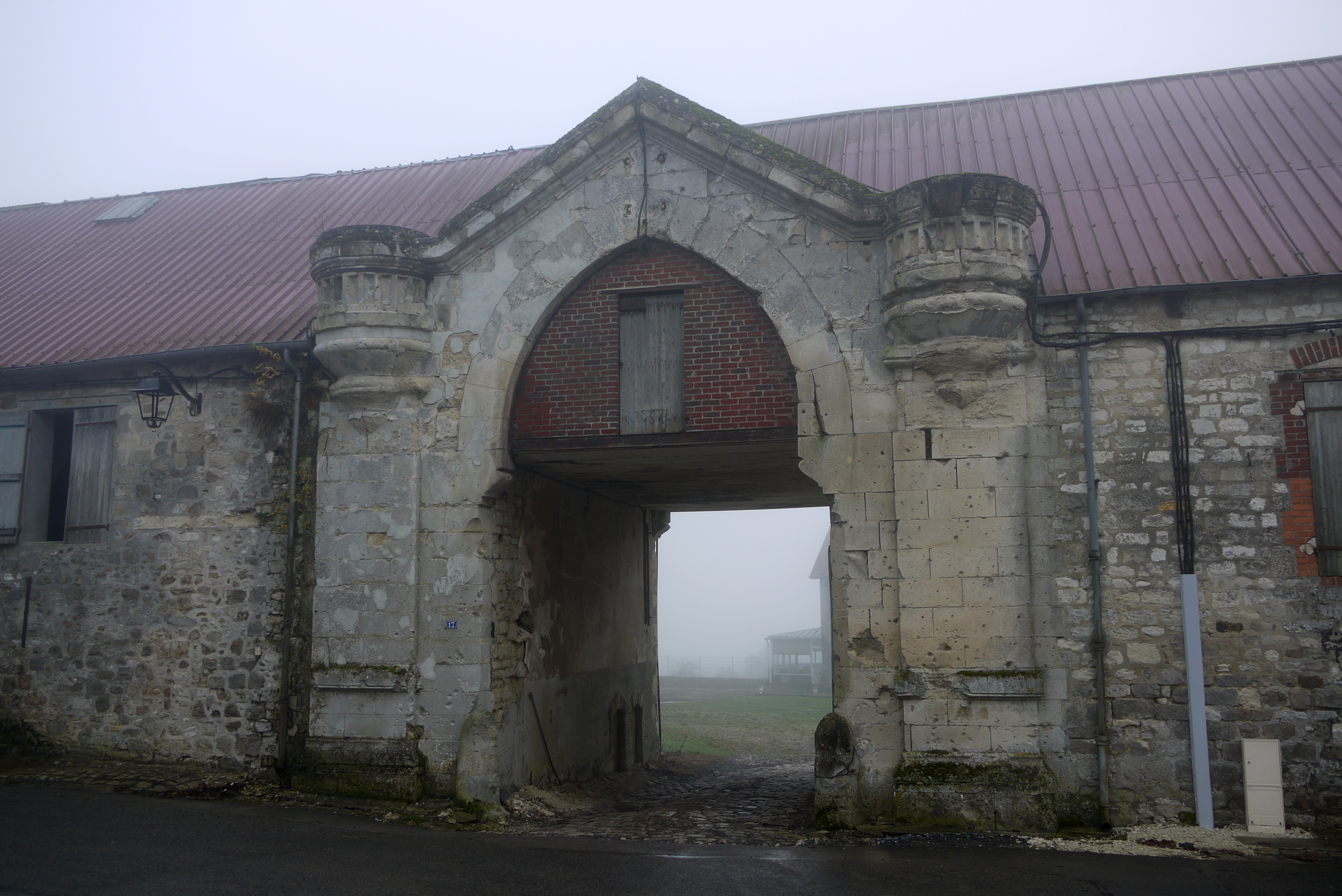 Porche d'une ferme